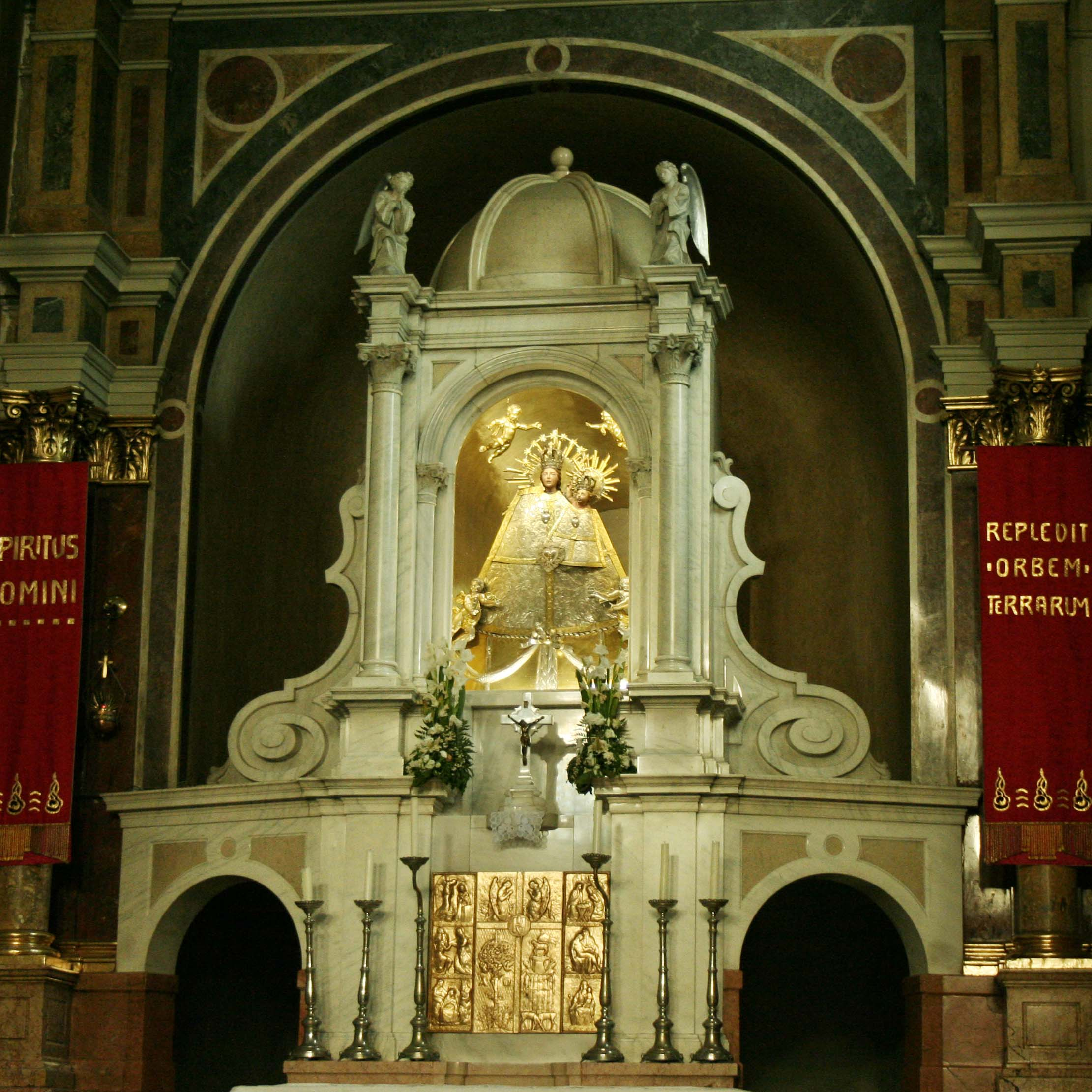 Máriagyüd templom oltára